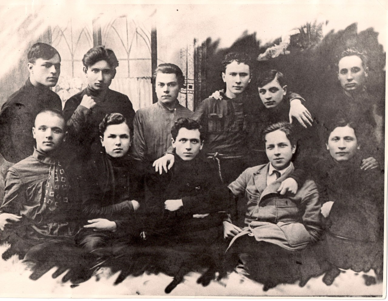 Беларуская (тарашкевіца): Літаратурнае аб’яднаньне «Маладняк». Сядзяць: Язэп Падабед, Алесь Якімовіч, Міхась Чарот, Алесь Дудар, Язэп Пушча. Стаяць: Адам Бабарэка, Нічыпар Чарнушэвіч, Паўлюк Трус, Анатоль Вольны, Андрэй Александровіч, Кузьма Чорны. 1924 — 1925 гг.